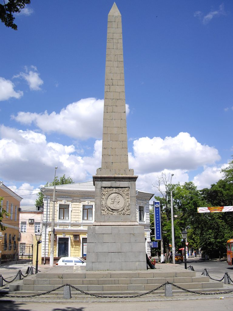 Simferopol. Долгоруковский шпиль. Установлен в честь победы над турецкими войсками. «Вчерашний день, 17 июля, обрадована я была вашими вестниками, кои приехали друг за другом следующим порядком: на рассвете конной гвардии секунд-ротмистр князь Иван Одоевский со взятием Каффы; в полдень гвардии подпоручик Щербинин — с занятием Керчи и Еникале, а перед захождением солнца артиллерии поручик Семенов с ключами всех сих мест и с вашими письмами». Это из письма Екатерины II командующему 2-й русской армией во время русско-турецкой войны 1768—1771 гг. генерал-аншефу В. М. Долгорукову. А развивались события так. В июне 1771 г. войска под его командованием штурмом овладели Перекопскими укреплениями(В. М. Долгоруков впервые отличился при взятии Перекопа еще в 1736 г. 14-летним солдатом армии Миниха.), часть их через Арабатскую стрелку вступила в восточный Крым. Русские заняли крупный торговый город Кефе (Феодосию) и Керчь с крепостью Еникале. Крым был провозглашен независимым от Османской империи. За блестящую победу русских войск князь В. М. Долгоруков получил вторую фамилию — Крымский, георгиевский орден первой степени, 60 тыс. рублей и табакерку с портретом императрицы, ибо «к незабвенной славе России завоевал он Крымский полуостров... отворил российскому флоту путь через Босфор Циммерийский (Керченский пролив.— Ред.) в Черное море». Память о важном событии в многовековой борьбе русского народа против османской агрессии была увековечена еще в XIX в. 29 сентября 1842 г. на месте, где, по преданию, стояла палатка В. М Долгорукова, открыт памятник-обелиск высотой 18,5 м из диабаза (архитектор Штрайхенберг, работы по камню Федора Вахрушева). По краям обелиска были врыты в землю стволы пушек долгоруковских времен, на чугунных столбах установлены старинные фонари, а сама четырехгранная колонна украшена барельефами.